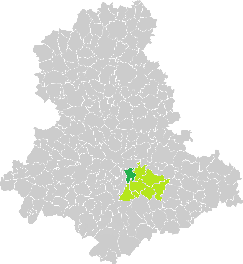 Carte de situation de la commune de Boisseuil (en vert foncé) dans le votre Canton (en vert clair) sur une carte des communes de la Haute-Vienne